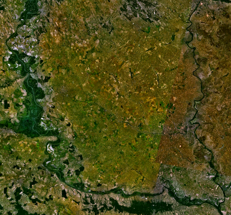 Снимак Бачке у симулираним бојама, из НАСА-иног сателита Ландсат 7. Слика направљена помоћу програма NASA World Wind.